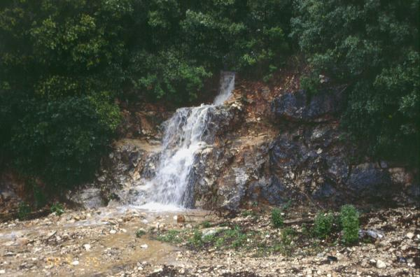 מפל בנחל נשר בכרמל